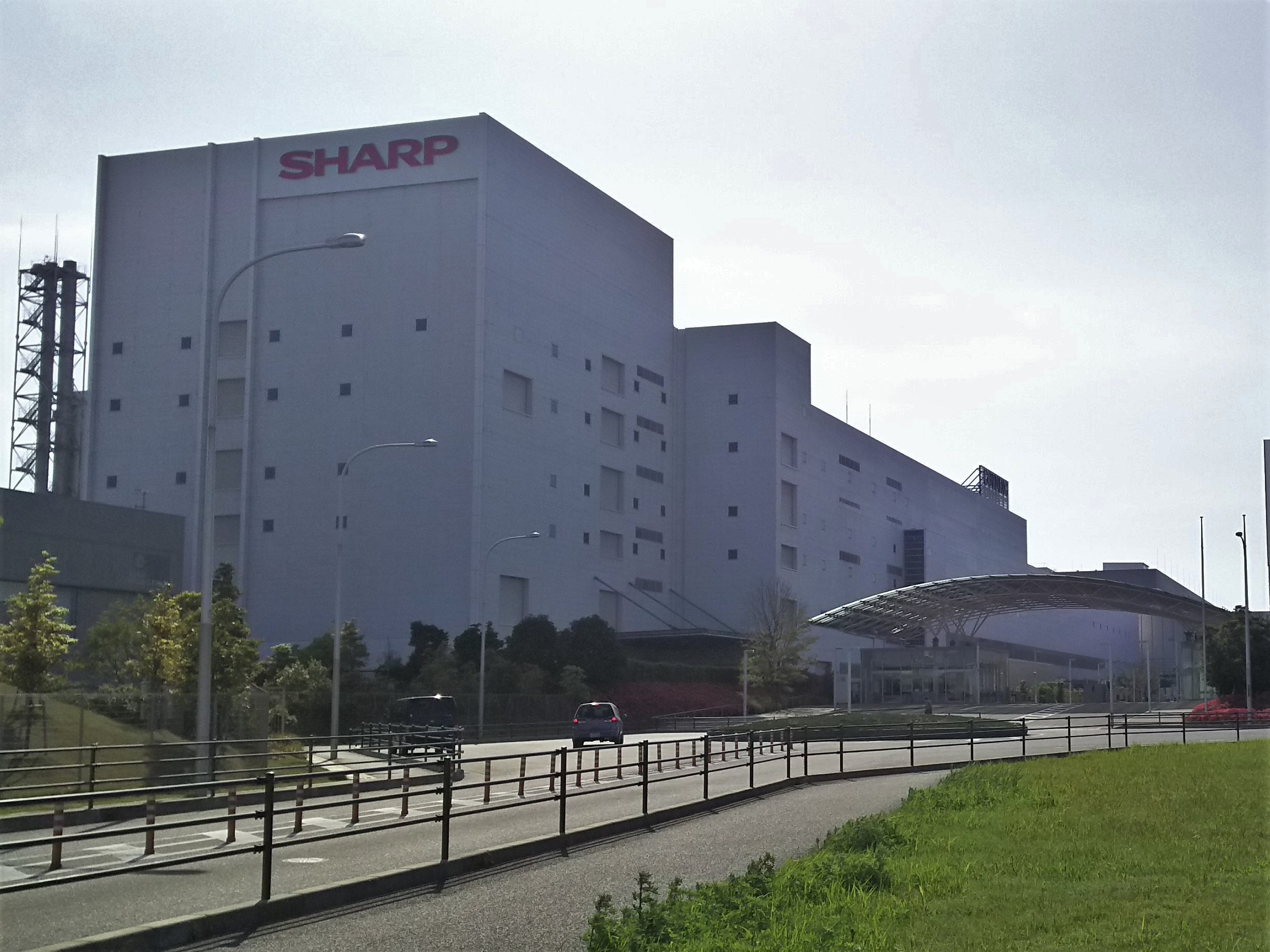 シャープ本社・堺事業所（大阪府堺市）